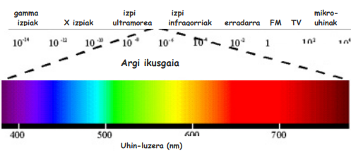 Argi espektroa